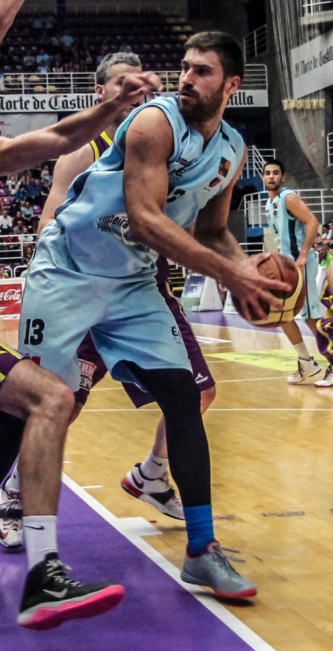 Partido entre C.B.Valladolid y C.B.Breogán en el polideportivo Pisuerga en Valladolid.